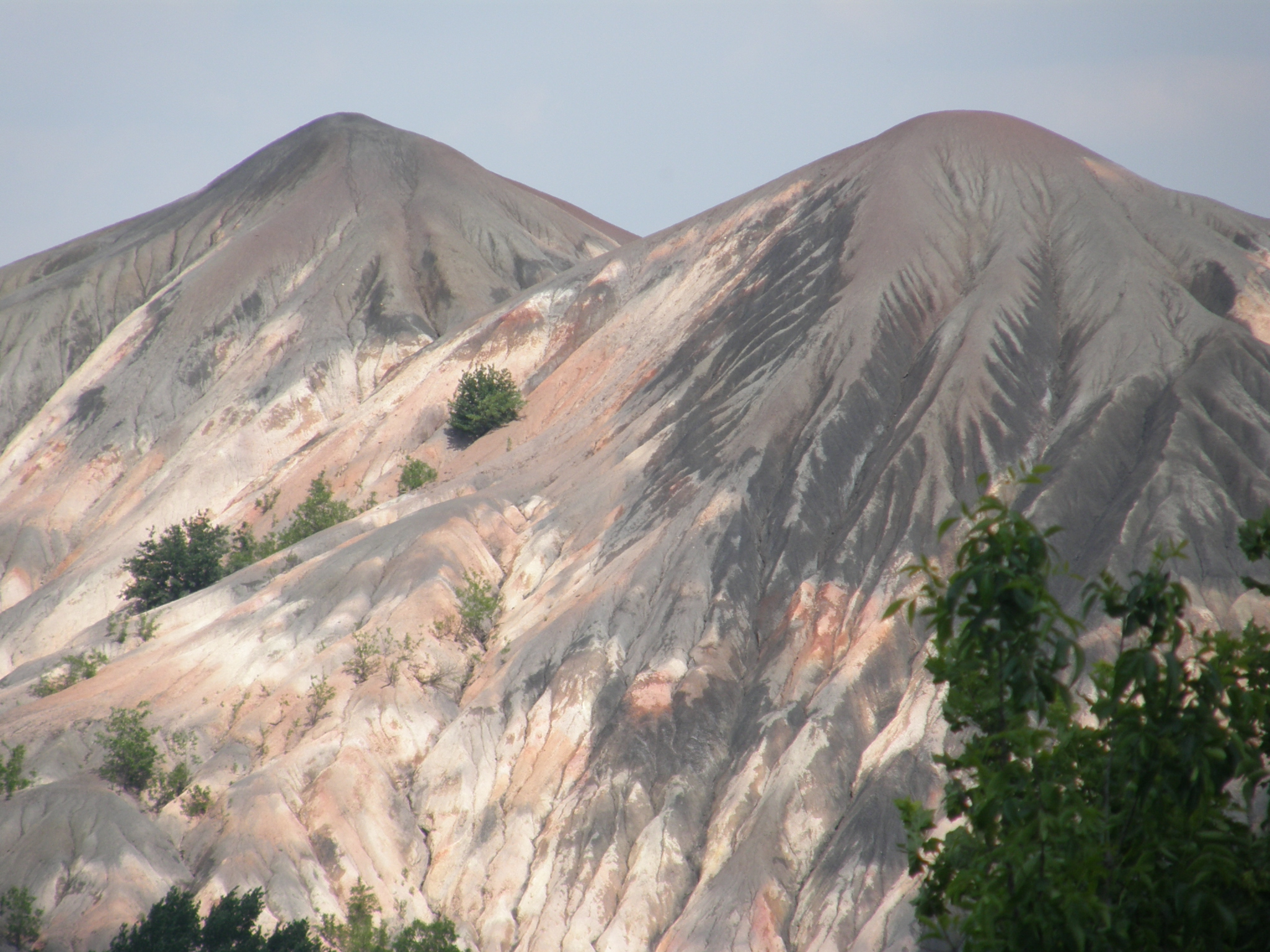 Будённовский район Донецка